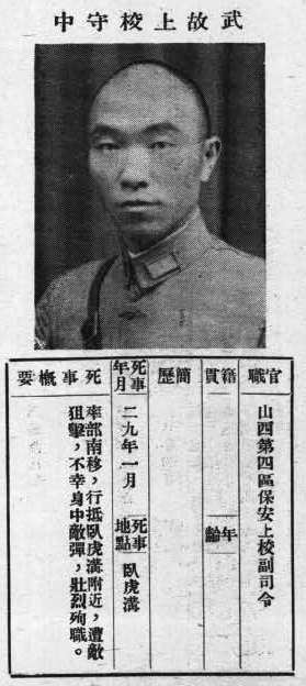 中文（台灣）: 抗戰軍人忠烈錄第一輯中的烈士遺像